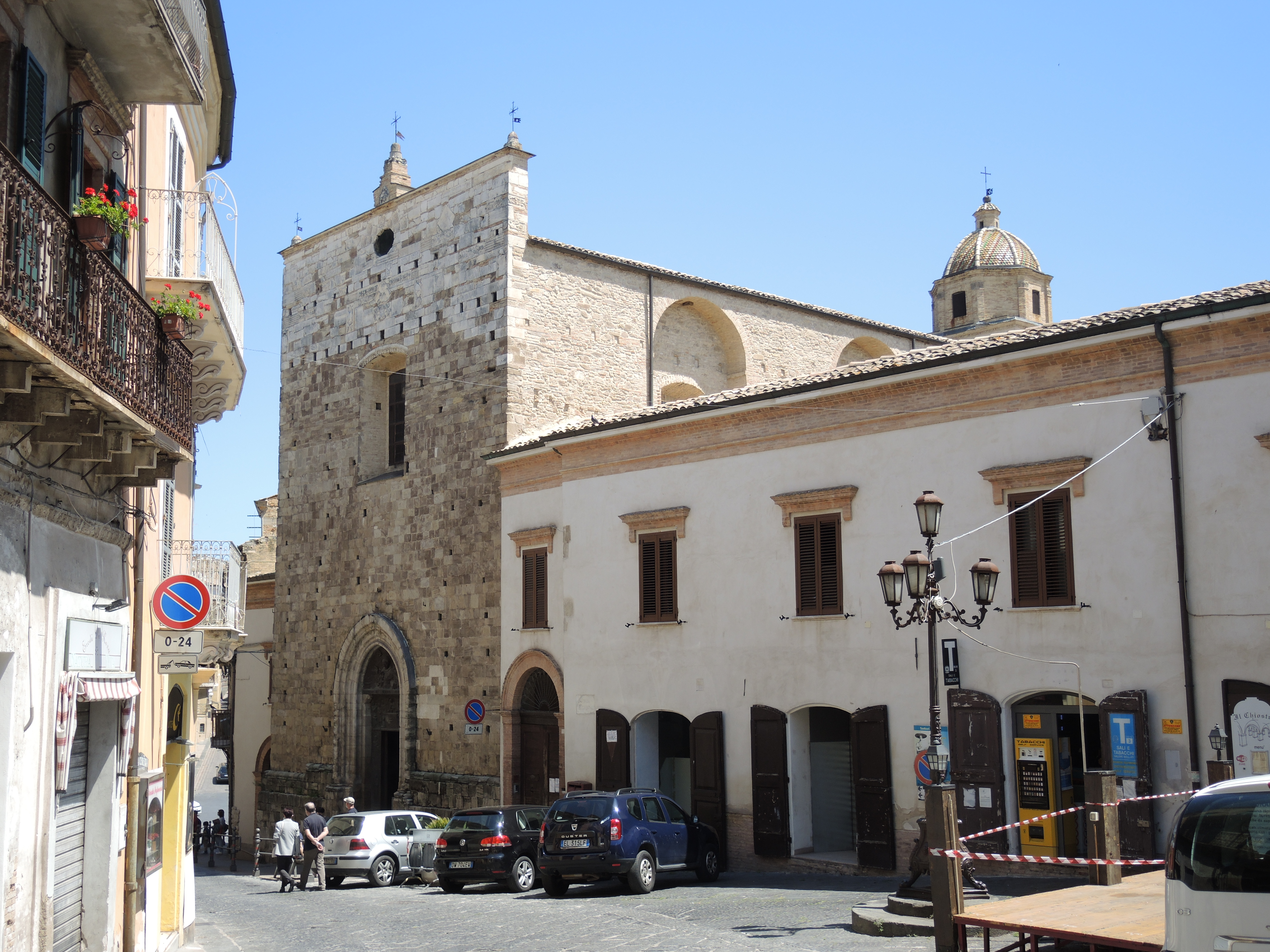 Lanciano - Chiesa di San Francesco